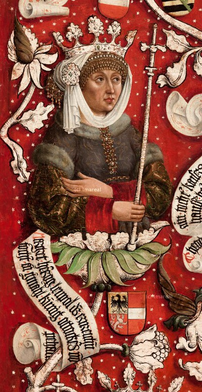 Margarete von Babenberg, auch Margareta von Österreich, tschechisch Markéta Babenberská, (* 1204 oder 1205; † 29. Oktober 1266 auf der Burg Krumau am Kamp) war die Ehefrau des deutschen Thronfolgers Heinrich (VII.) und erste Ehefrau des böhmischen Königs Přemysl Ottokar II. (Babenberger Stammbaum, Stift Klosterneuburg)